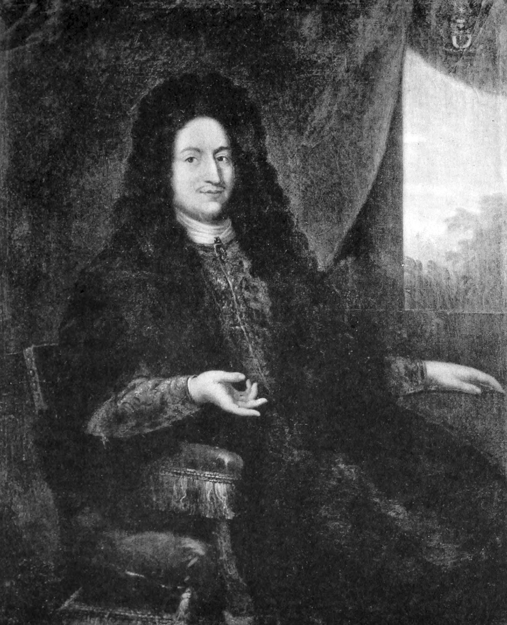 Zakarias Wattrang (1620-1687). Medelålders man, knäfigur, sittande, fas t. v., gör med högra handen en gest, stöder den venstra mot ett bord. Han har bruna ögon, svarta ögonbryn, smala underrakade mustascher, stor svart hög benad allongeperuk nedfallande på ryggen och öfver venstra axeln. Hvit lindad halsduk, i hvilken guldinfattad sten, höghalsad gyllendukslifrock knäppt med fasonerade förgyllda knappar med infattad sten, mörk kappa. Han sitter i karmstol, klädd med rödt och guldfransar, bakgrund röd gardin, t. v. utsikt genom ett fönster, uppe t. v. vapnet: delad sköld 1) tre gyllene stjärnor i svart fält, 2) röd tupp i silfv&r; hjälmprydnad, gyllene stjärna mellan två delade svart-röda vingar, rödt och gult hjälmtäcke. Under står: Zacharias Wattrang Archiater Regis natus 5 Decemb A° 1620 obit d. 30 Julii 1687. Olja på duk, 142 x 120 ctm., af David Klöcker Ehrenstrahl. Tillhör Brukspatron T. Braunerhielin, Sandemar. PI. VI.